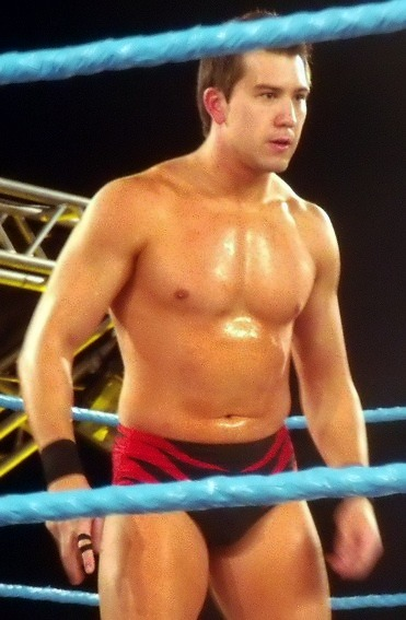 Richie Steamboat luchando en Florida Championship Wrestling.